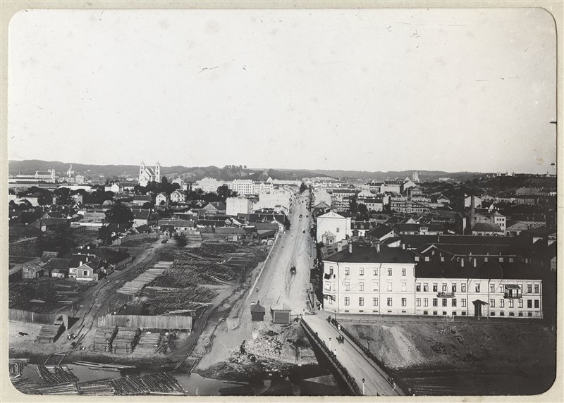 Vilnius, Gedimino pr. buvęs Šv. Georgijaus (Jurgio) prospektas 1900